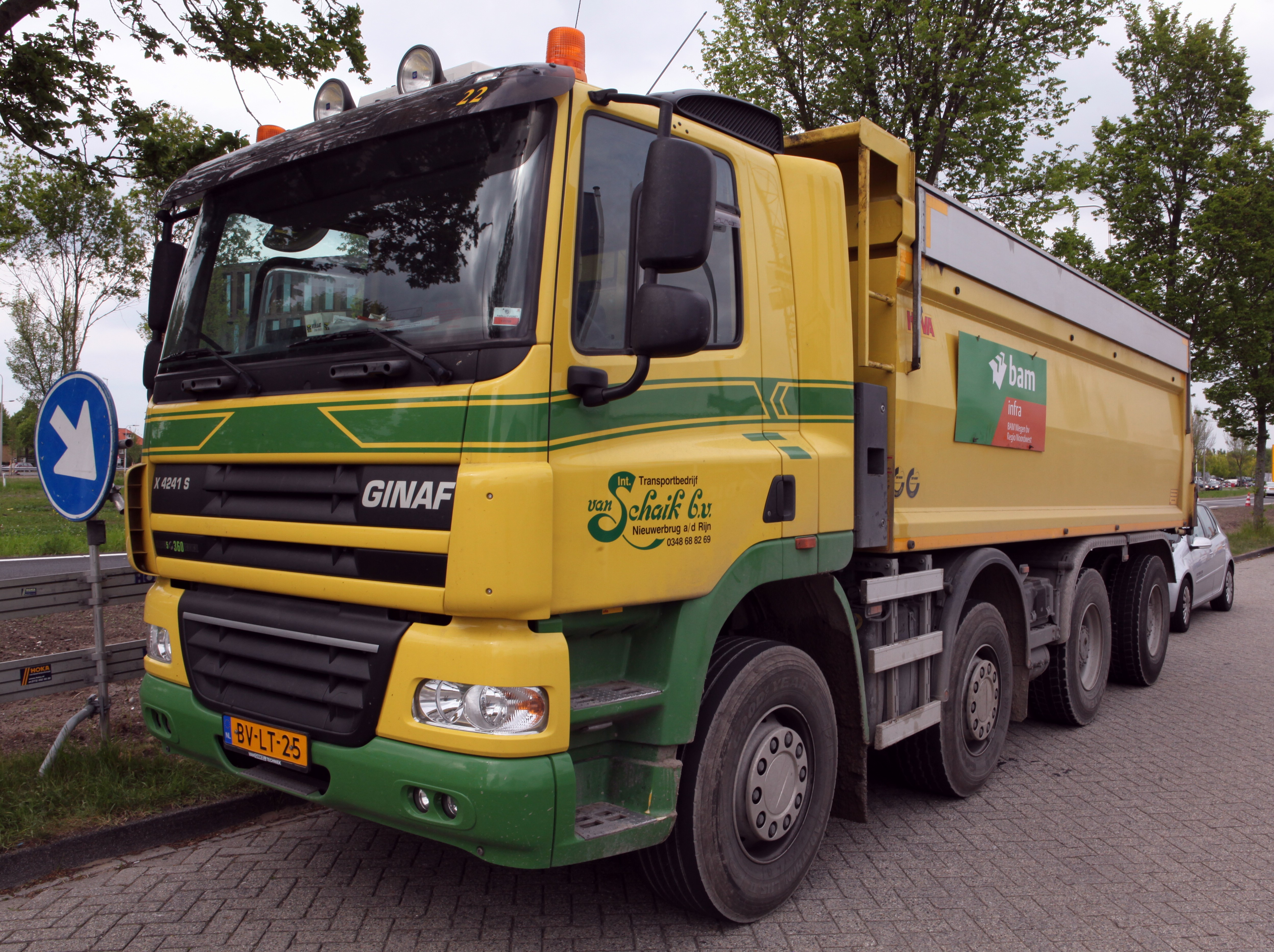 Ginaf X 4241 S van Schaik